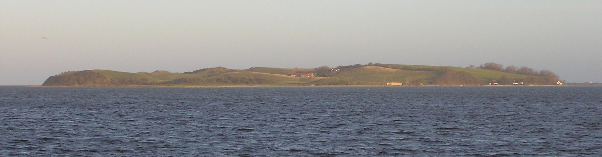 Danmark Nekselø